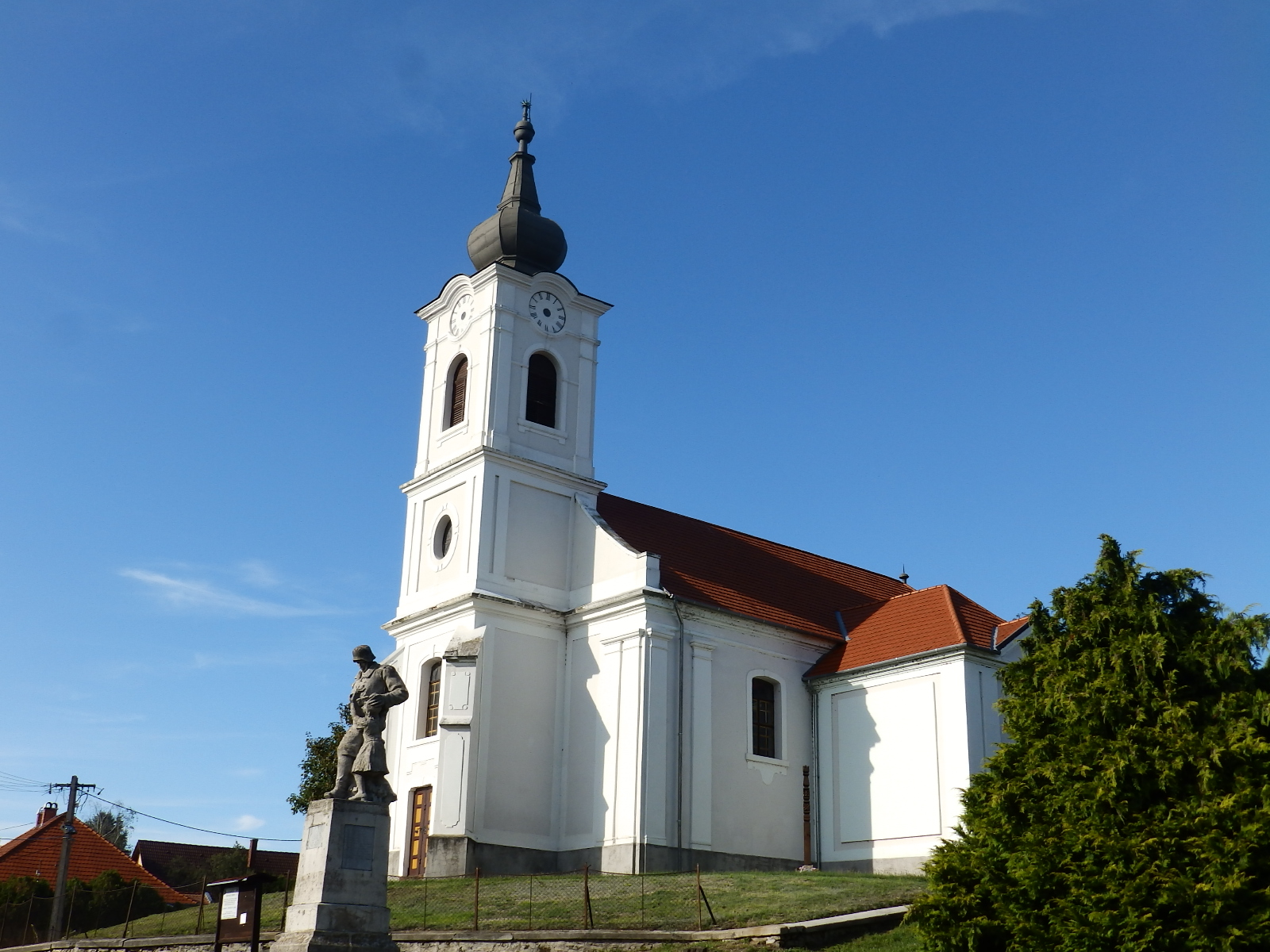 Református templom, Balatonfőkajár